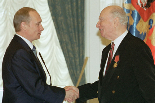 МОСКВА, КРЕМЛЬ. Церемония вручения государственных наград. Орден «За заслуги перед Отечеством» IV степени вручен композитору Оскару Борисовичу Фельцману.